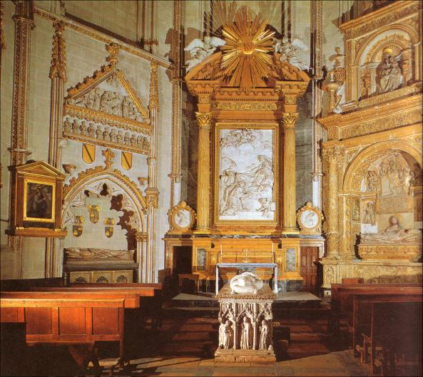 Capiulla de San Idelfonso en la Catedral de Santa María de Toledo.